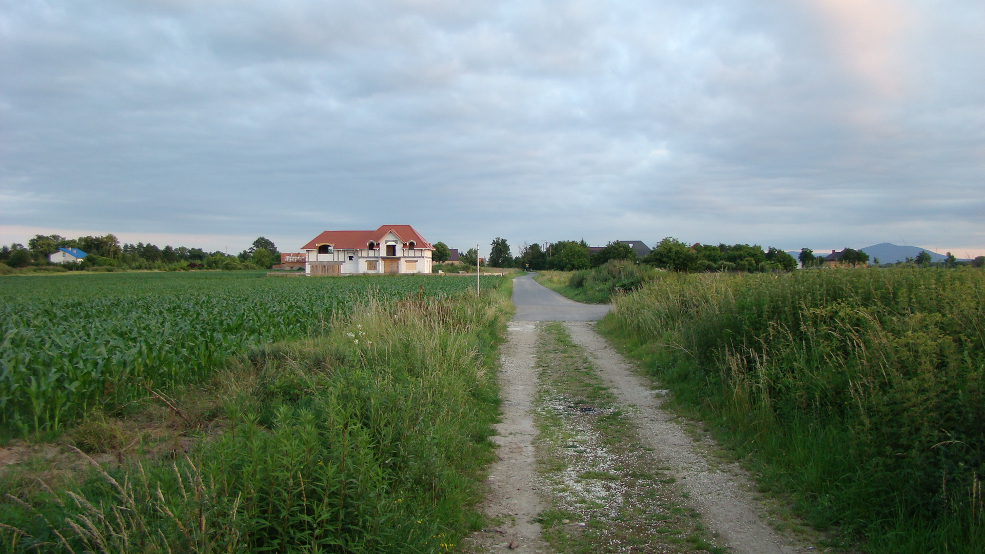 Racławice Wielkie (Gmina Kobierzyce, Poland)